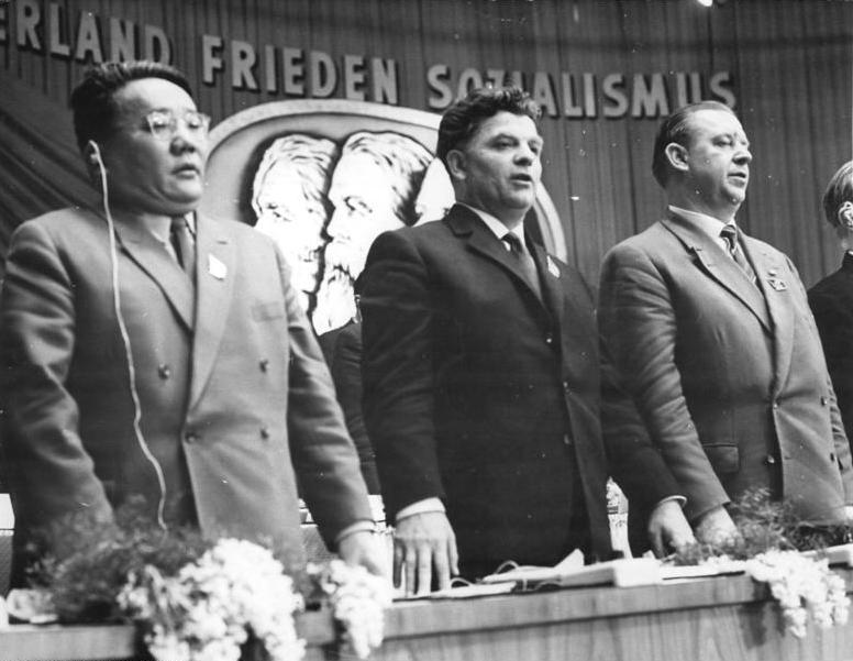 Zentralbild Kollektiv Me-Qu 21.1.1963 VI. Parteitag der SED vom 15.-21.1.1963 in der Werner-Seelenbinder-Halle in Berlin (6.Tag). UBz. Zum Abschluß des Parteitages sangen Delegierte und Gäste die "Internationale". V.l.n.r.: Der Erste Sekretär des ZK der Mongolischen Revolutionären Volkspartei Jumshagin Zedenbal und die Kandidaten des Politbüros des ZK der SED, Paul Fröhlich und Gerhard Grüneberg. (Schaar)"